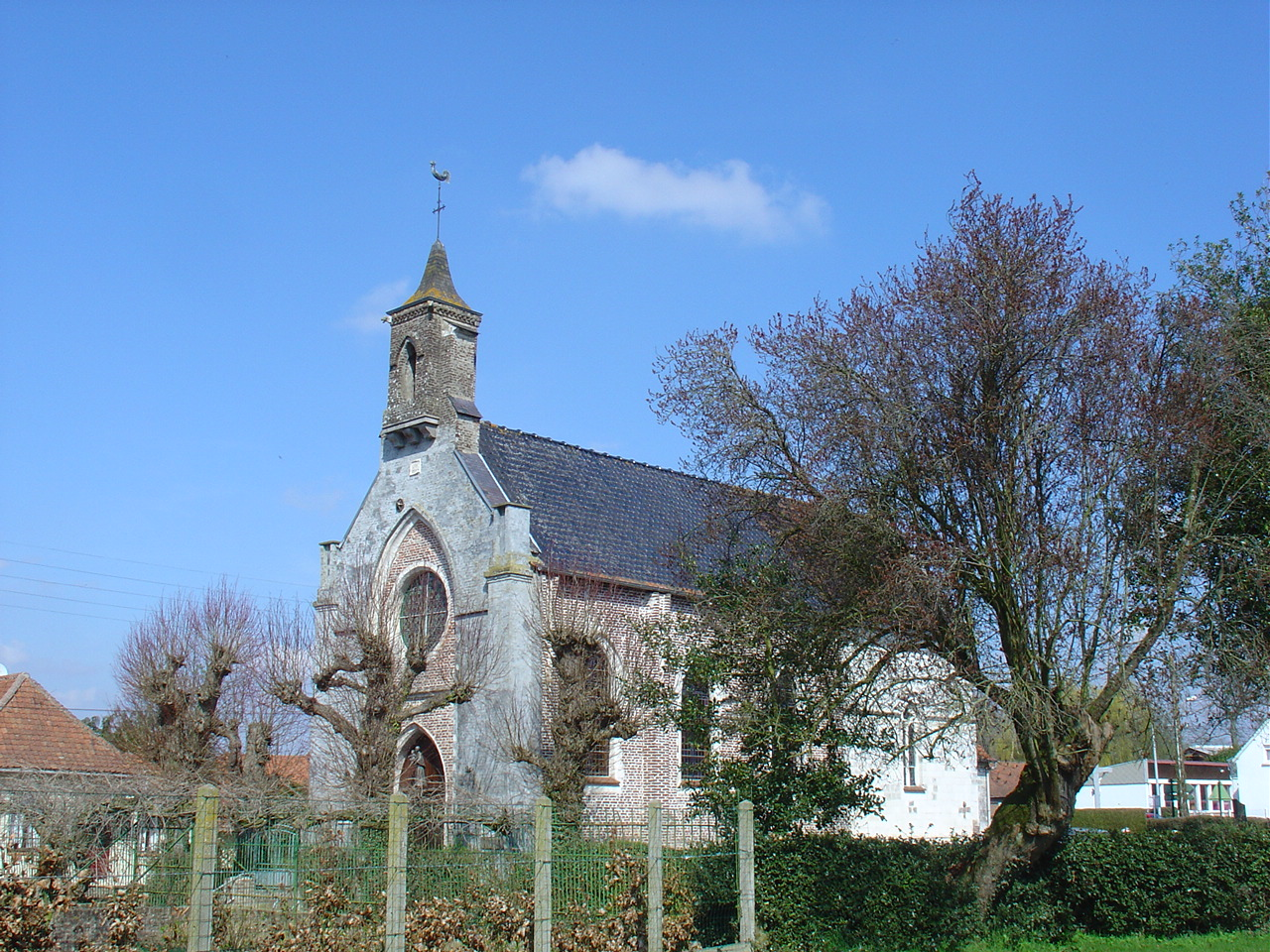 Église de Fresnoy